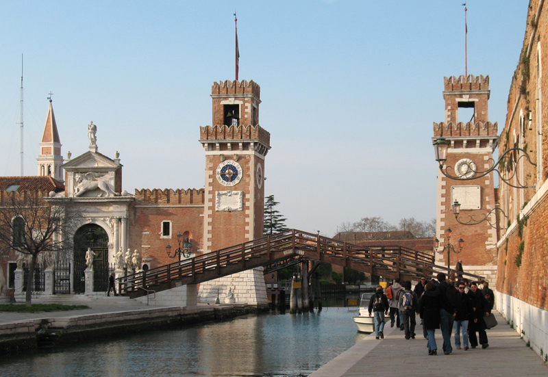 Venedig, Südeingang des Arsenals